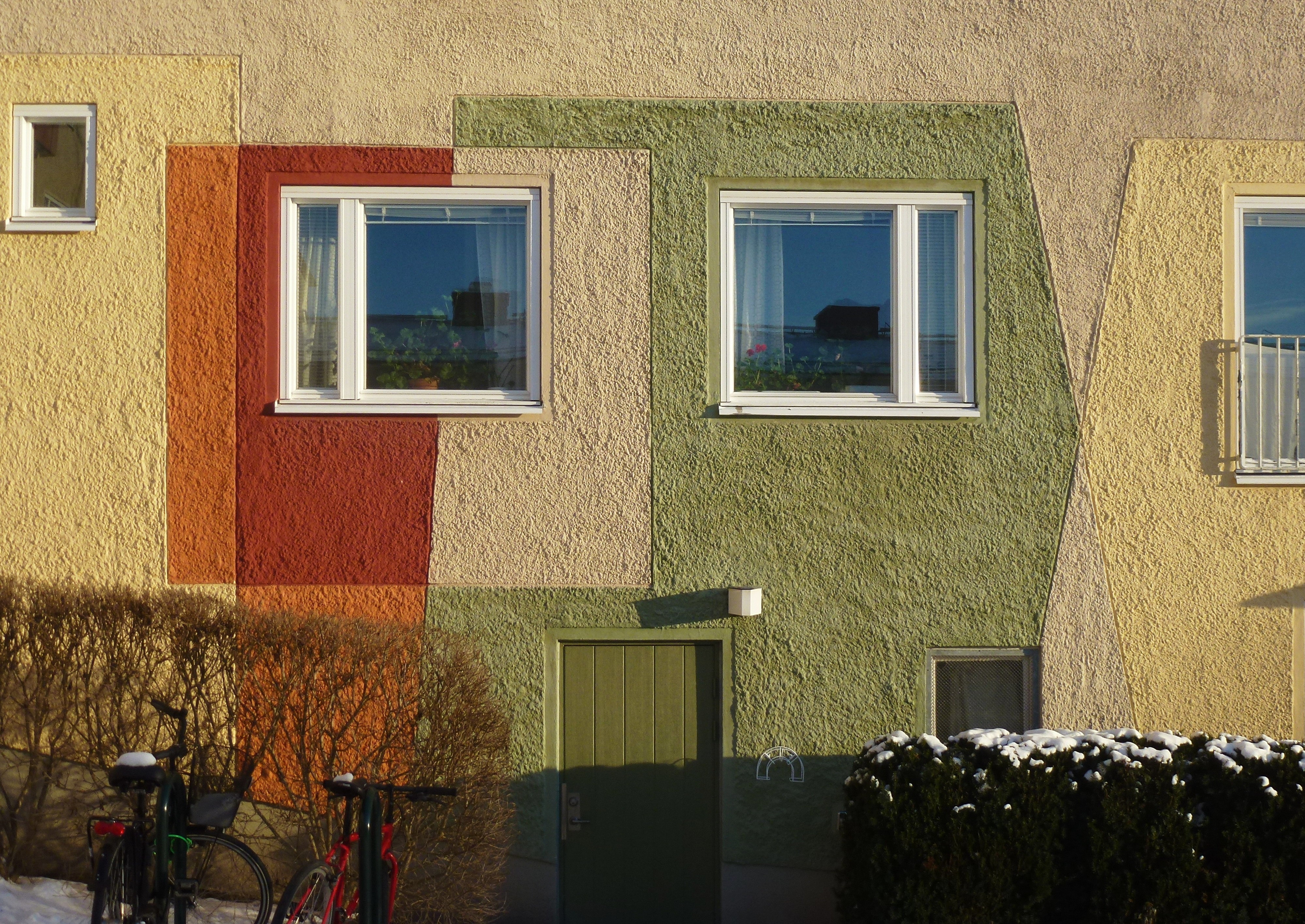 Sickla strand, fasad, geometrisk mönster